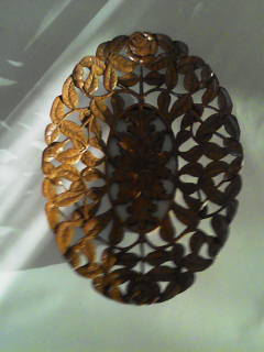 litho dentelle en palissandre de Jean Chrysostome (Madagascar)